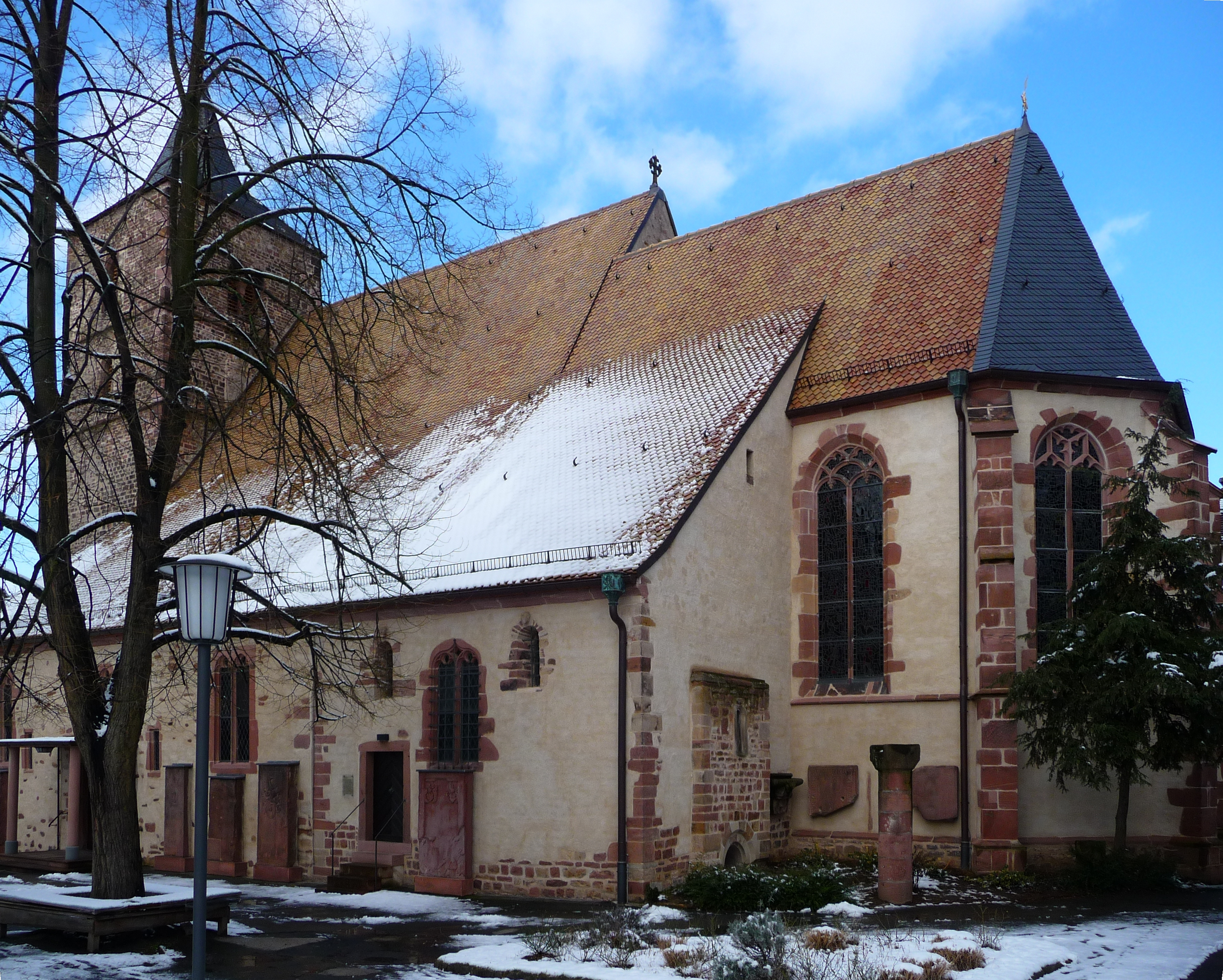 Ansicht von Südosten auf die katholische Kirche St. Vitus in Heidelberg-Handschuhsheim (Deutschland)